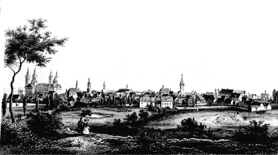 Ansicht der Stadt Speyer